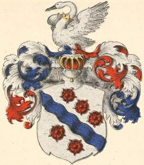 Rosenbachi suguvõsa aadlivapp